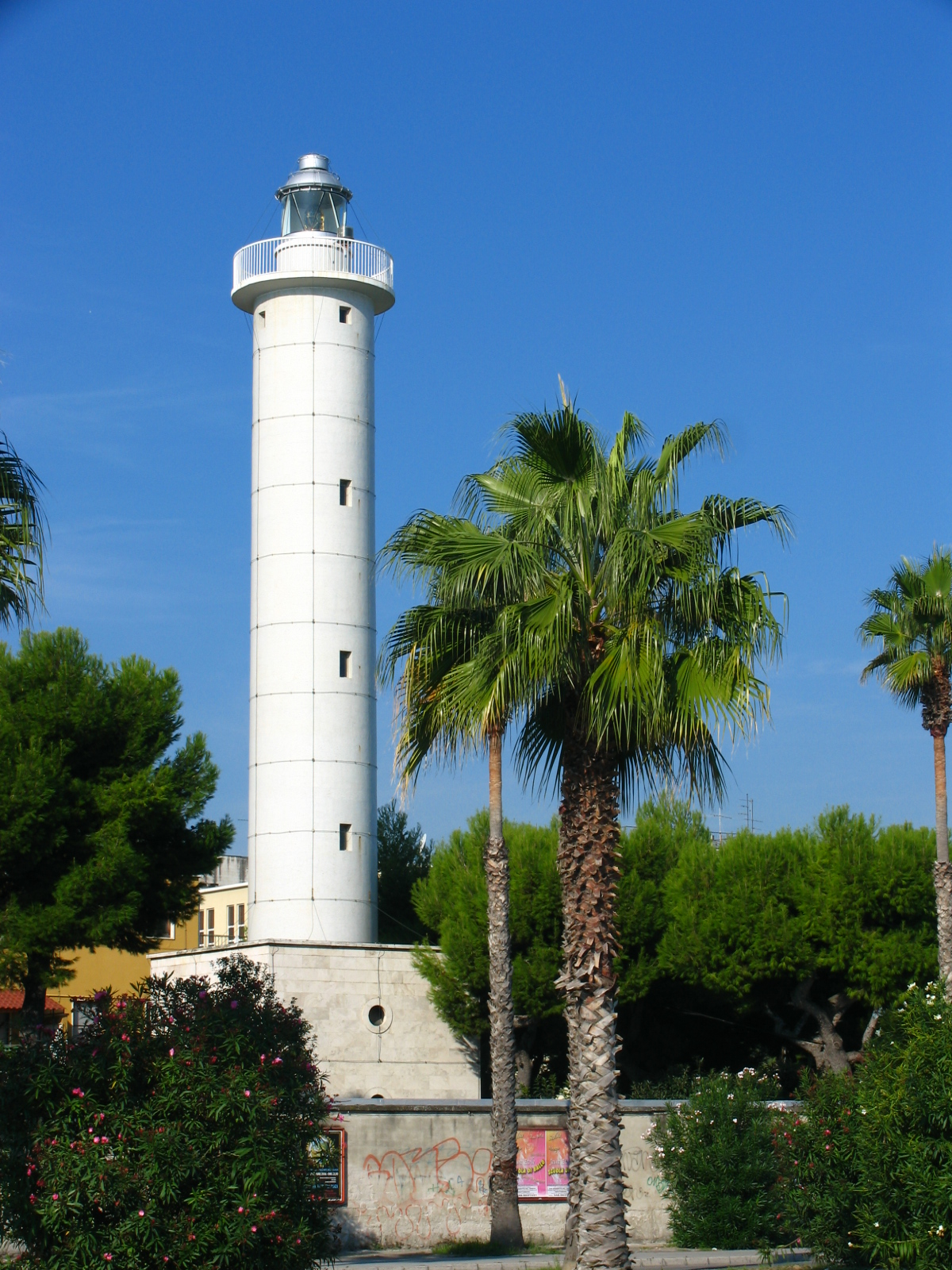 San Benedetto del Tronto, Marche, Italia